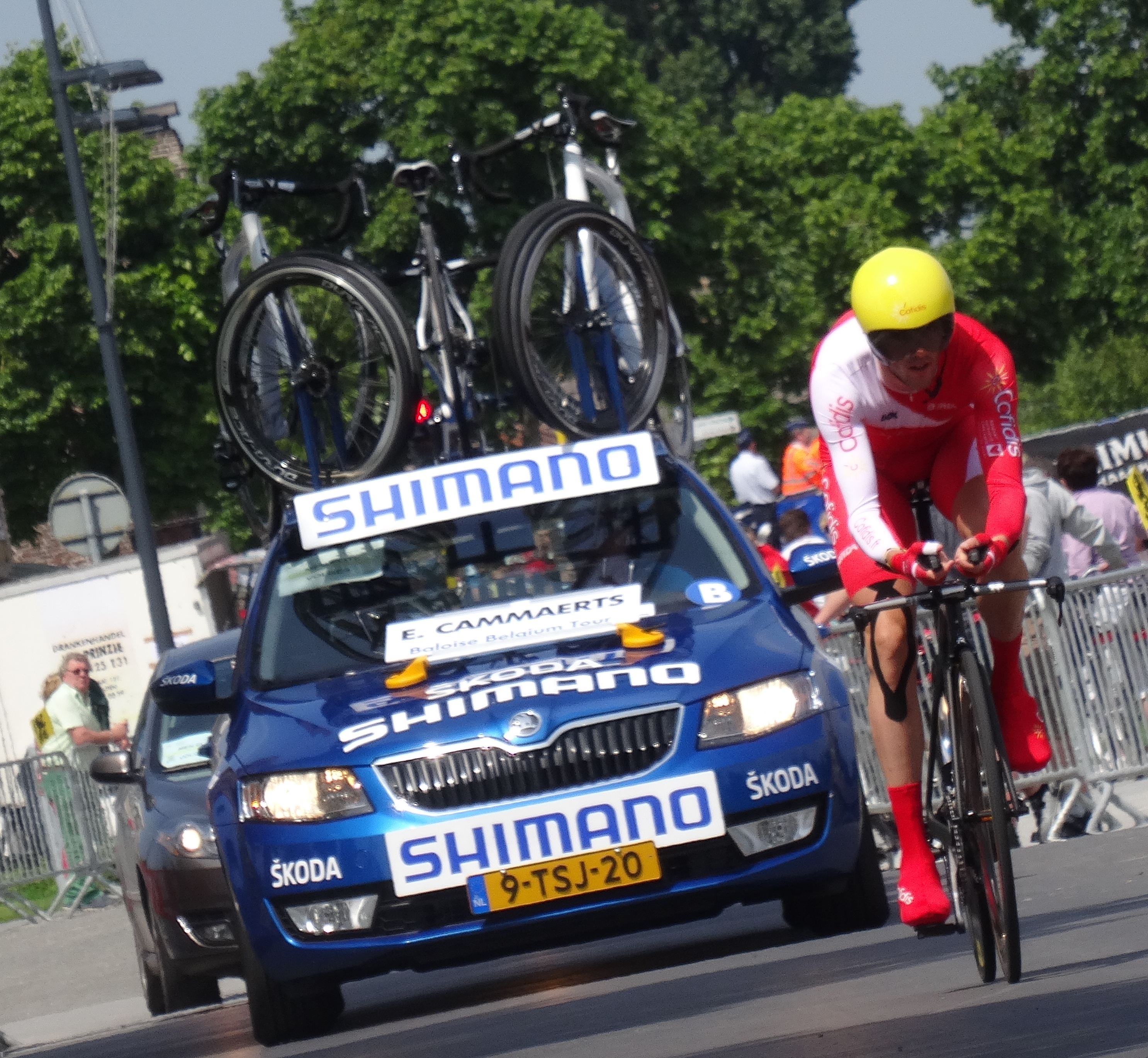 Reportage photographique réalisé le vendredi 30 mai à l'occasion du contre-la-montre individuel de la troisième étape du Tour de Belgique 2014 à Dixmude, Belgique.